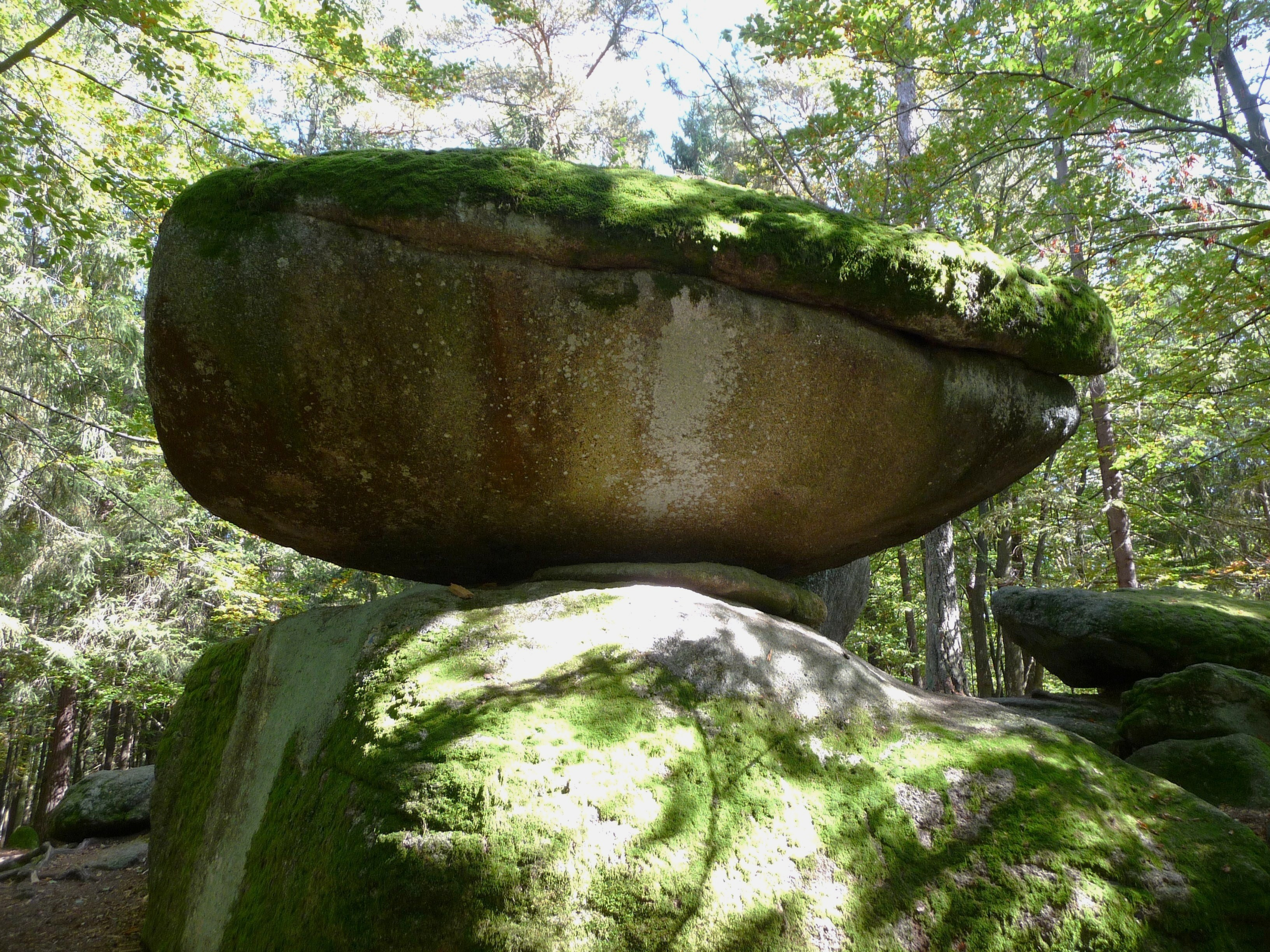 Der Wackelstein von Loh